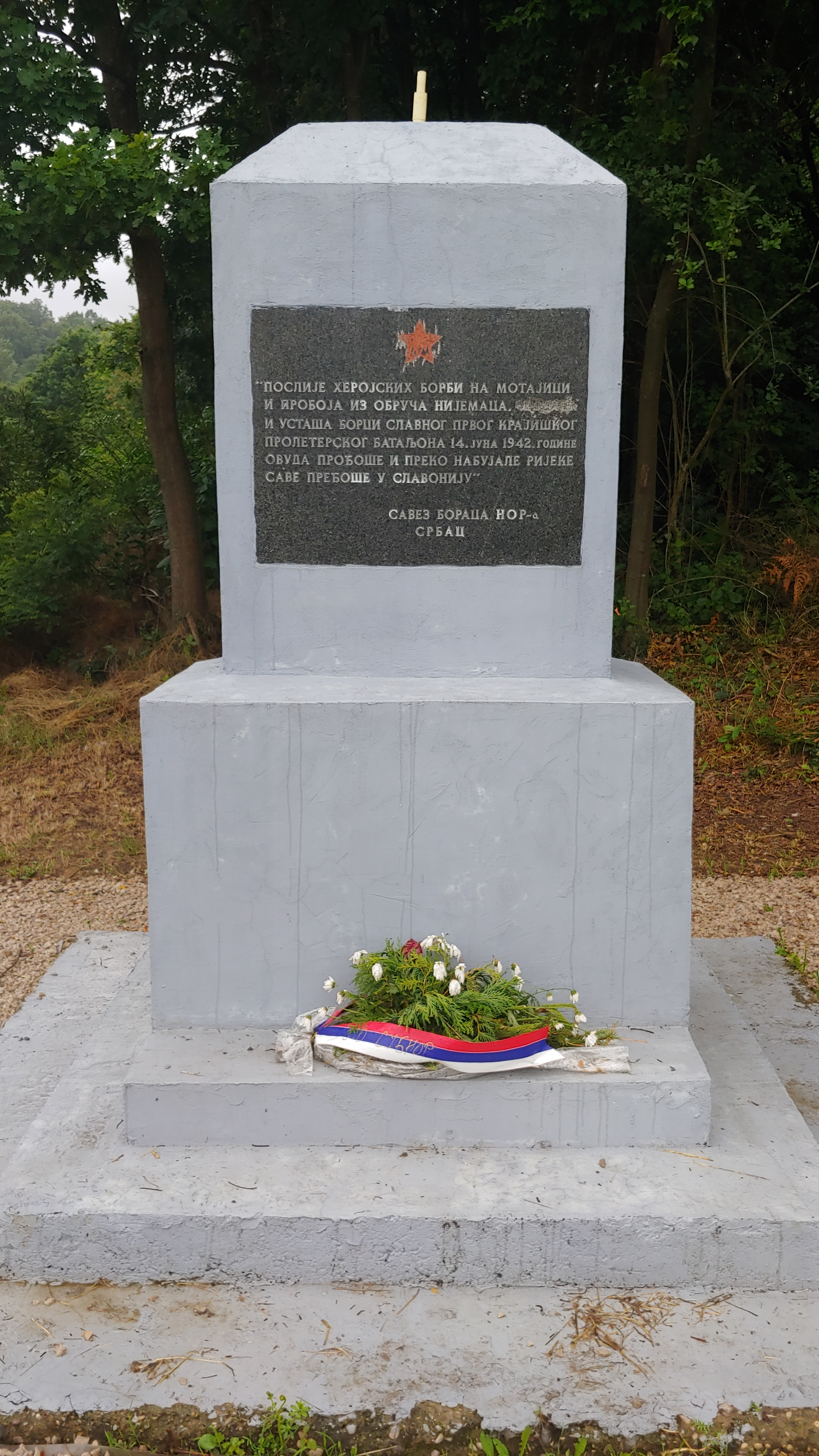 Споменик партизанима, на мјесту на којем су прешли ријеку Саву бјежећи пред фашистима. Влакница, општина Србац